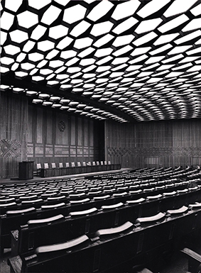 Salle OMNIA extension du Siège central du Parti Bucarest.